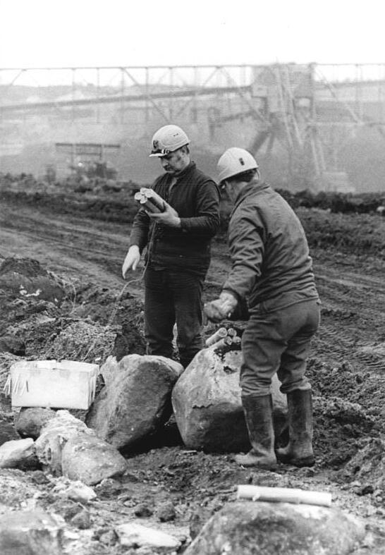 Tagebau Meuro, Sprengtechniker Sprengung vorbereitend ADN-ZB Weisflog 28.12.1989 Bez. Cottbus: Tagebau- Trotz schwieriger geologischer Bedingungen setzten die Kumpel im Tagebau Meuro in diesen Tagen alles daran, um den Kohlestrom nicht versiegen zu lassen. Auch das Kollektiv Sprengtechnik unterzeichnete vor kurzem eine Willenserklärung der Meuroer Bergleute gegen Streiks und Arbeitsniederlegungen, die das "Licht aus!" für Wohnungen, Produktionsstätten und medizinische Einrichtungen bedeuten würden.